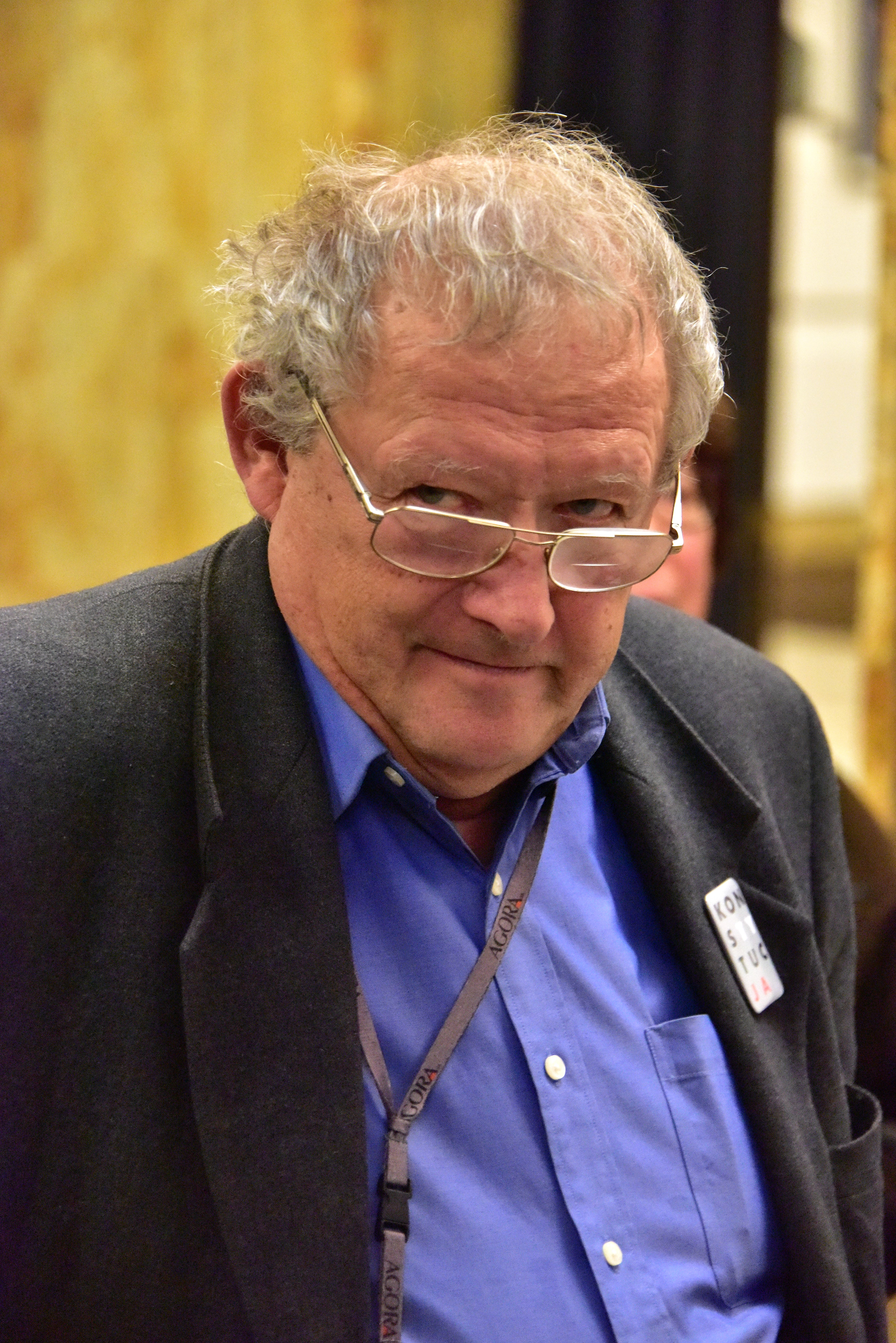 Adam Michnik podczas uroczystości Urodzin Ryszarda Kapuścińskiego i wręczenia Nagrody Translatorskiej dla Tłumaczy Ryszarda Kapuścińskiego za całokształt twórczości w Teatrze Dramatycznym (Scena na Woli im. Tadeusza Łomnickiego)